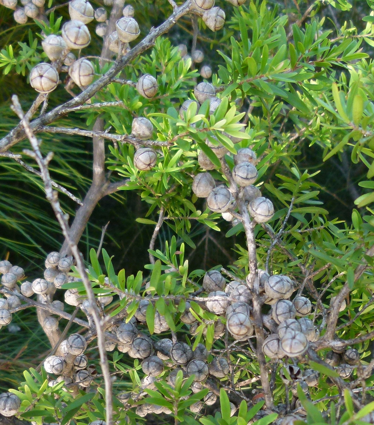 Jardin botanique Montjuic, Barcelone